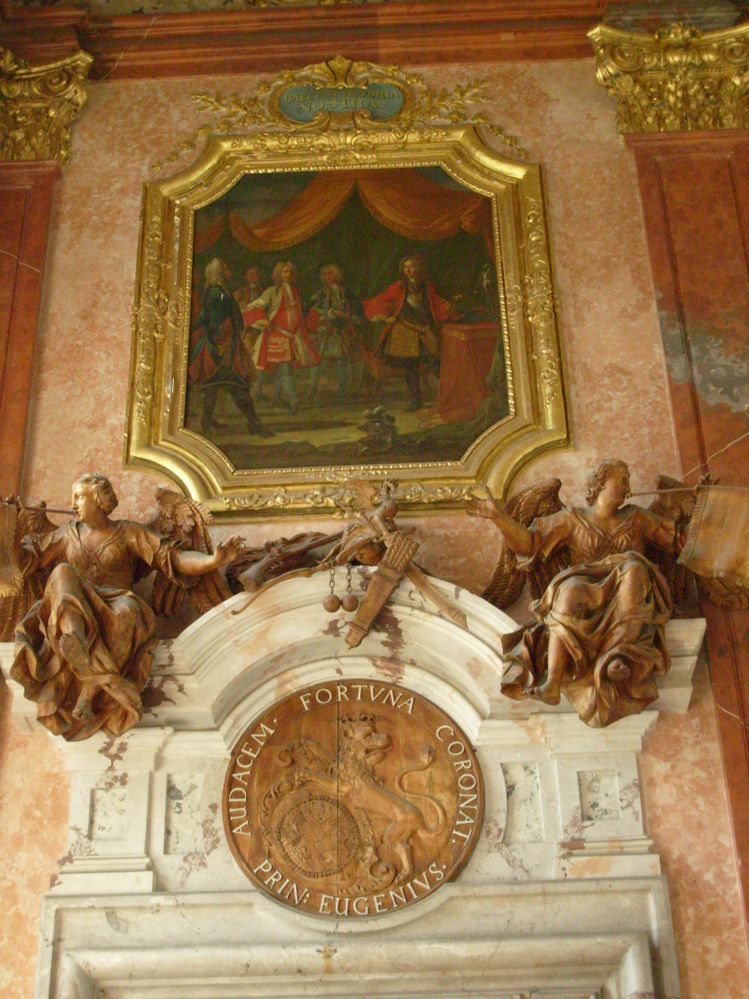 Bartolomeo Altomonte: Die Befreiung der Festung Belgrad. Chorherrenstift St. Florian.